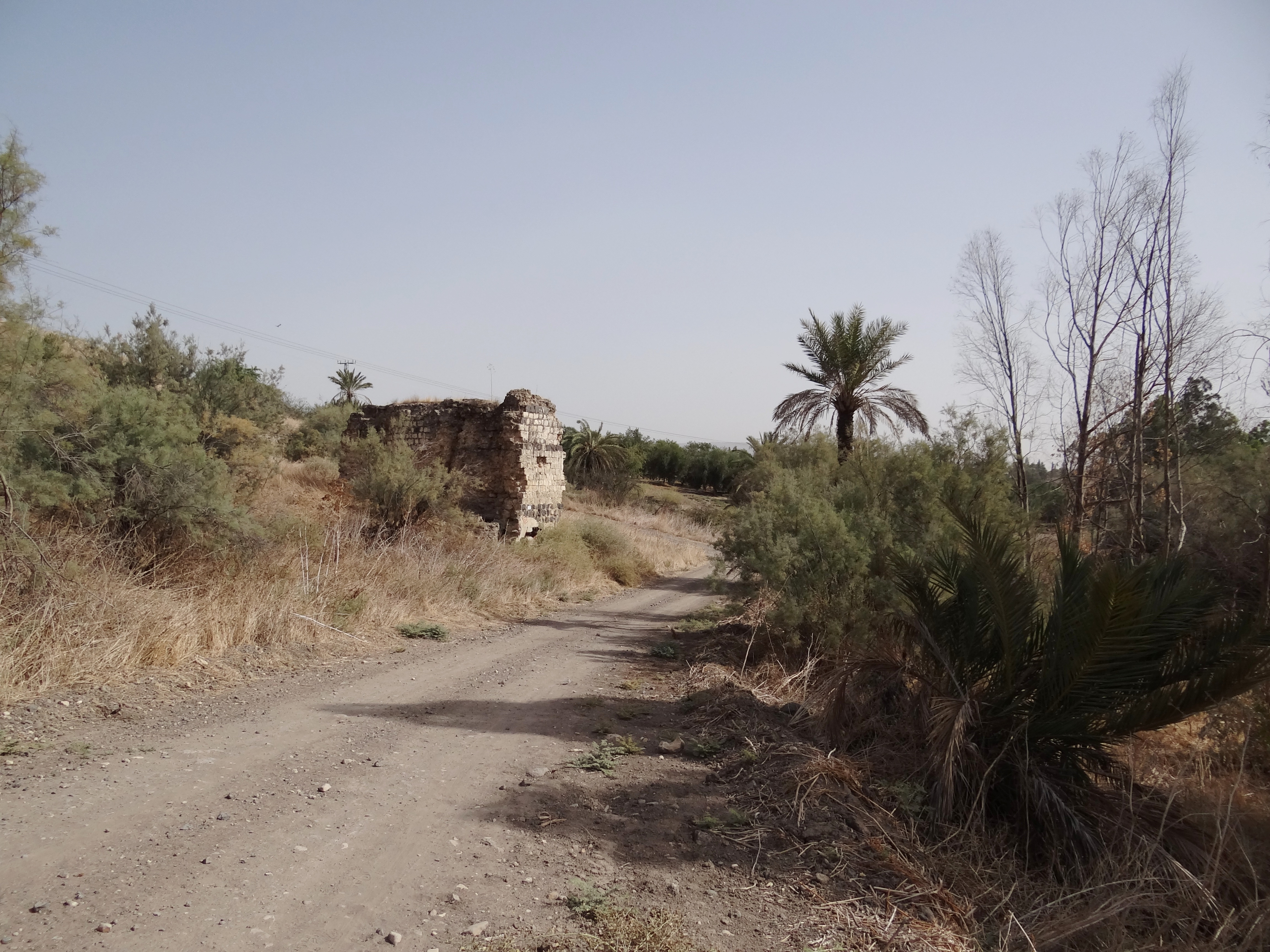 Tel Ubeidiya 3 km south of Lake Tiberias, in the Jordan Rift Valley, Israel, is an archaeological site of the Pleistocene תל עובדיה הוא תל בין המושבה מנחמיה לקיבוץ בית זרע, אשר בקרבתו אתר פרהיסטורי הנחשב לאחד האתרים הקדומים ביותר בעולם ובעל חשיבות רבה בקנה מידה עולמי להבנת האבולוציה של האדם. שרידי טחנת הקמח ליד התל